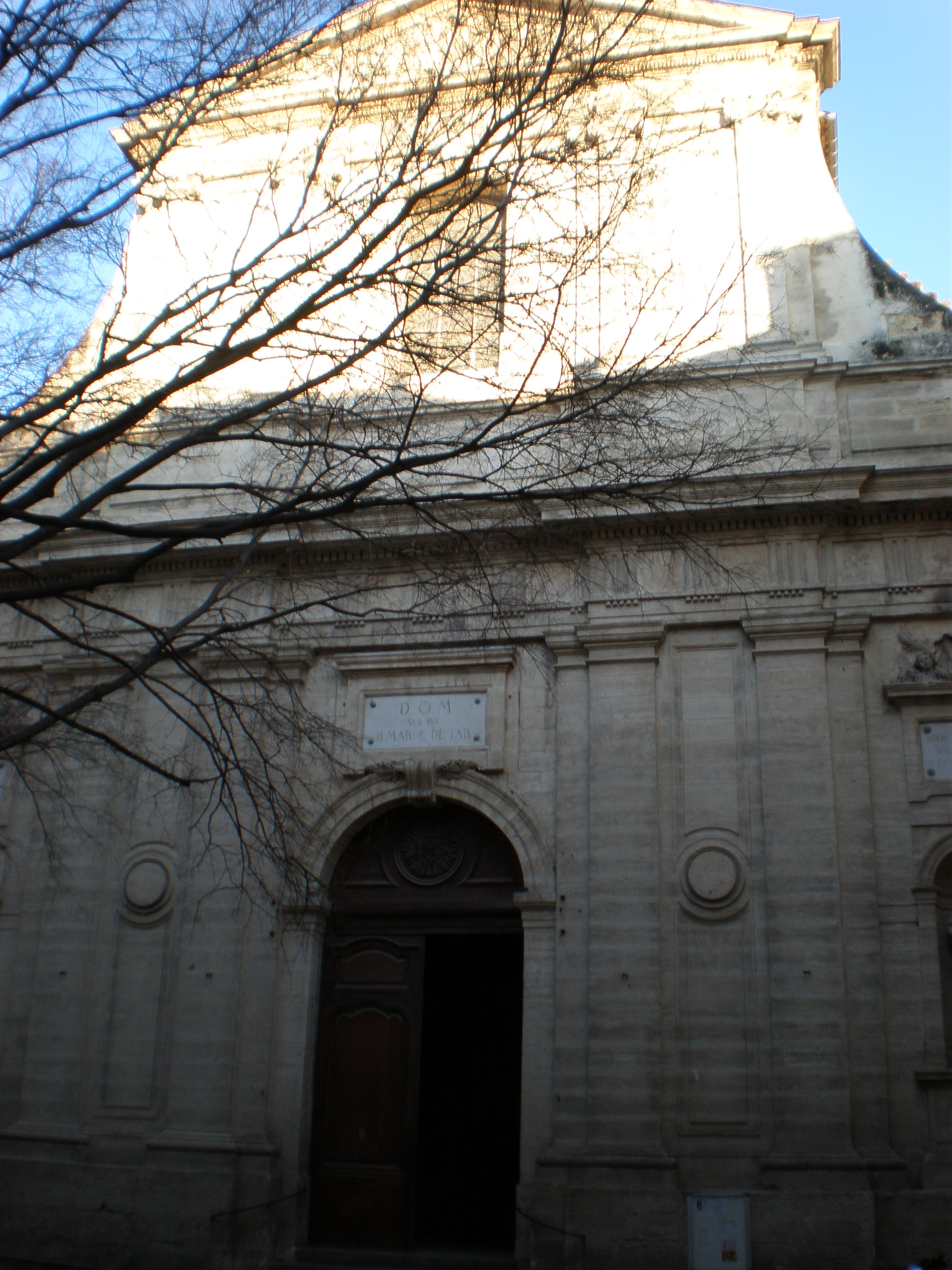 Façade de la basilique Notre-Dame des Tables de Montpellier